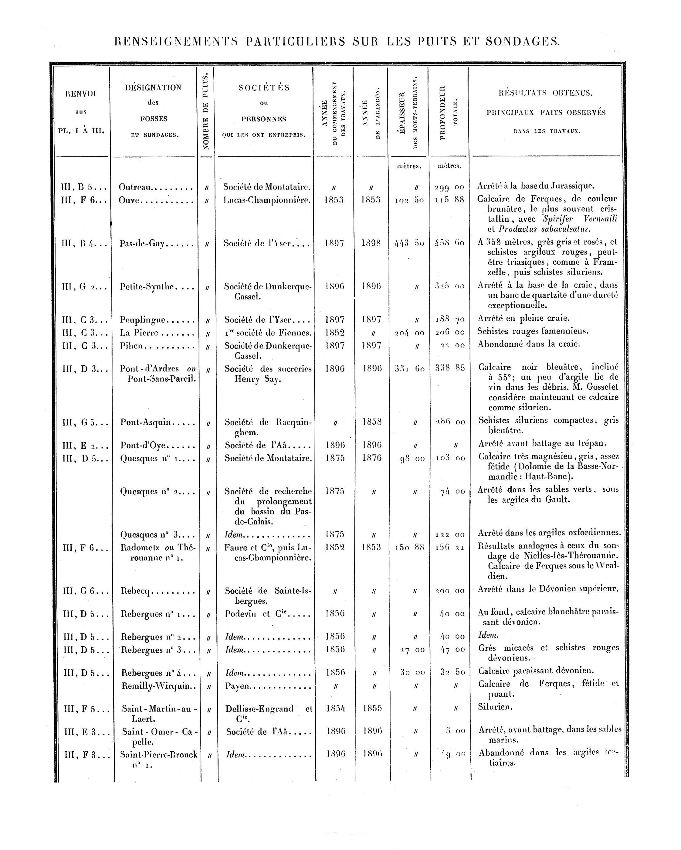 Liste des puits de mine et des sondages. Mines du Boulonnais. Document extrait de Étude des Gîtes Minéraux de la France. Topographie Souterraine du Bassin Houiller du Boulonnais ou Bassin d'Hardinghen, par A. Olry, ingénieur en chef des Mines. Chapitre IX, pages 172 à 189.